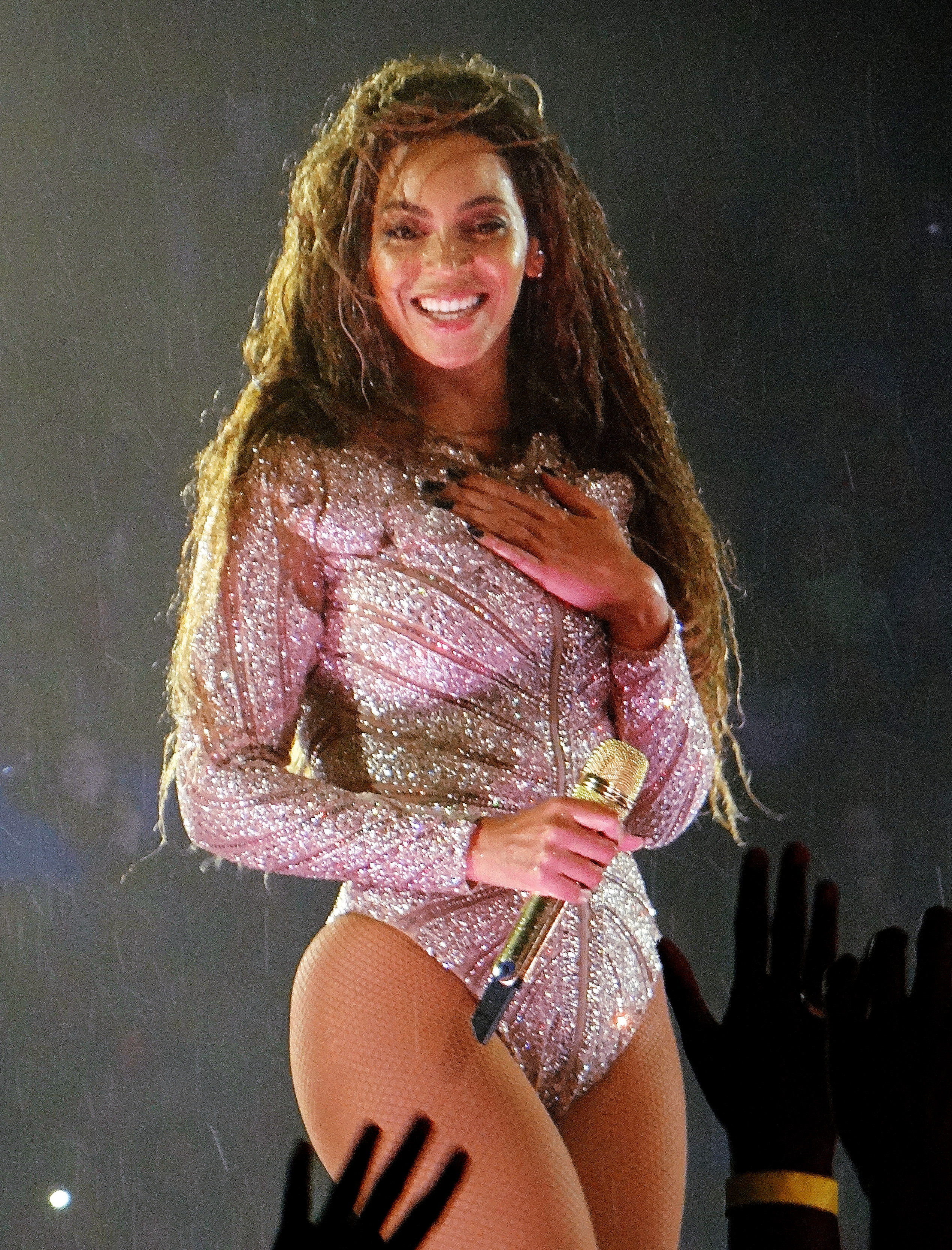 recorte de imagen original del formation tour en carolina del norte